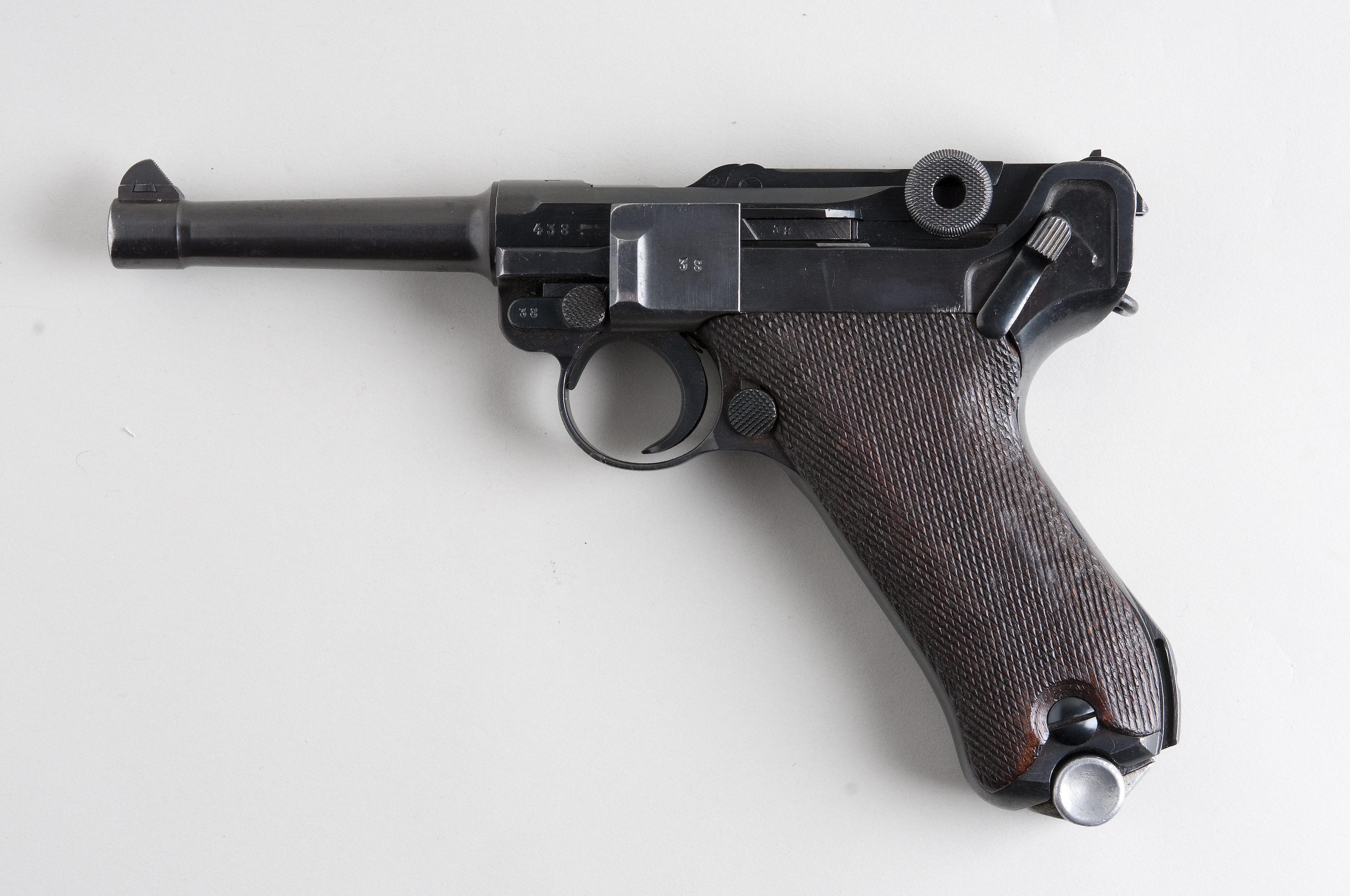 Luger P08 From flickr user handvapensamlingen - Pistols used in Norway.